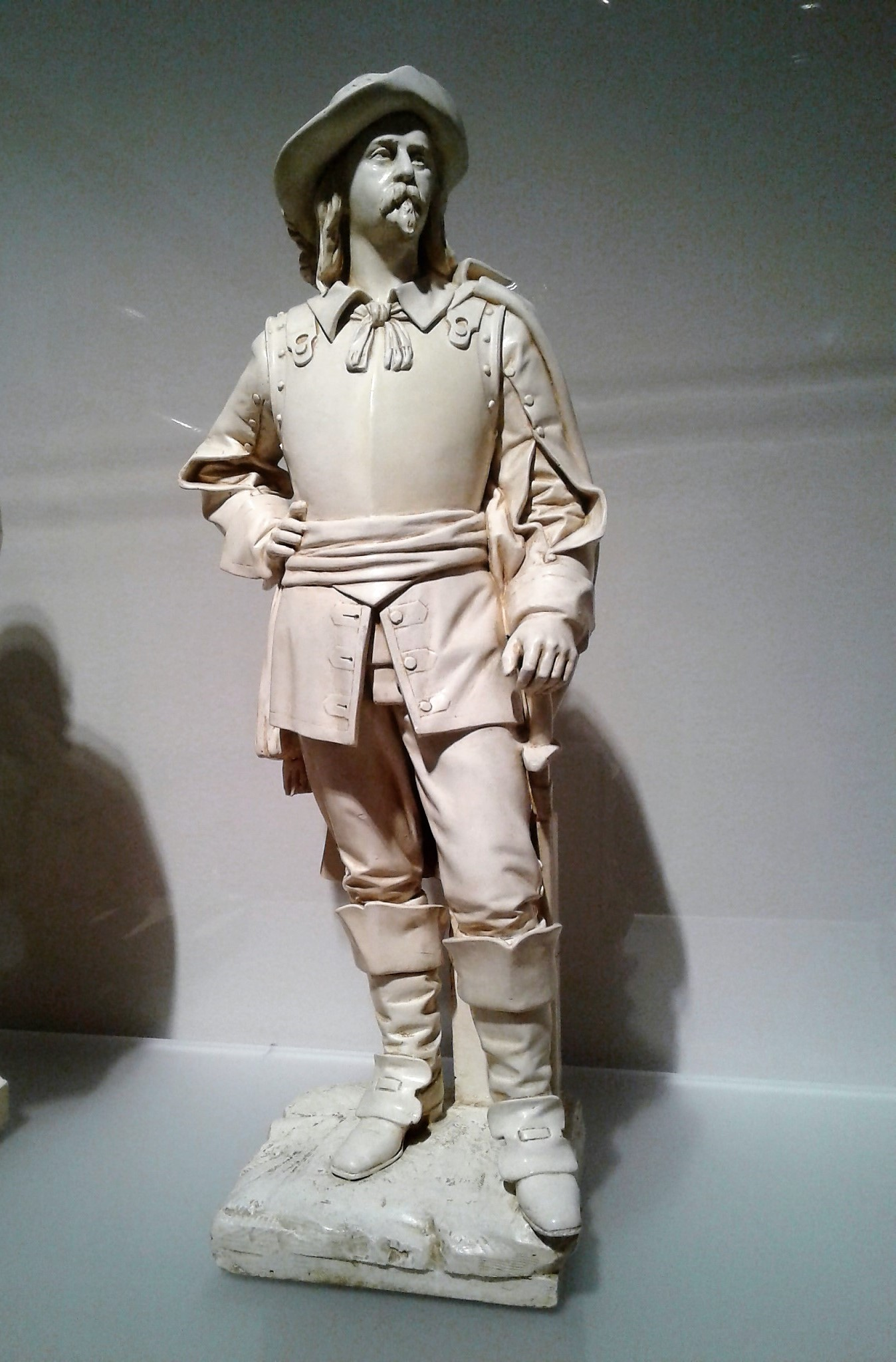 Laviolette, plâtre peint crème et brun réalisé par Louis-Philippe Hébert